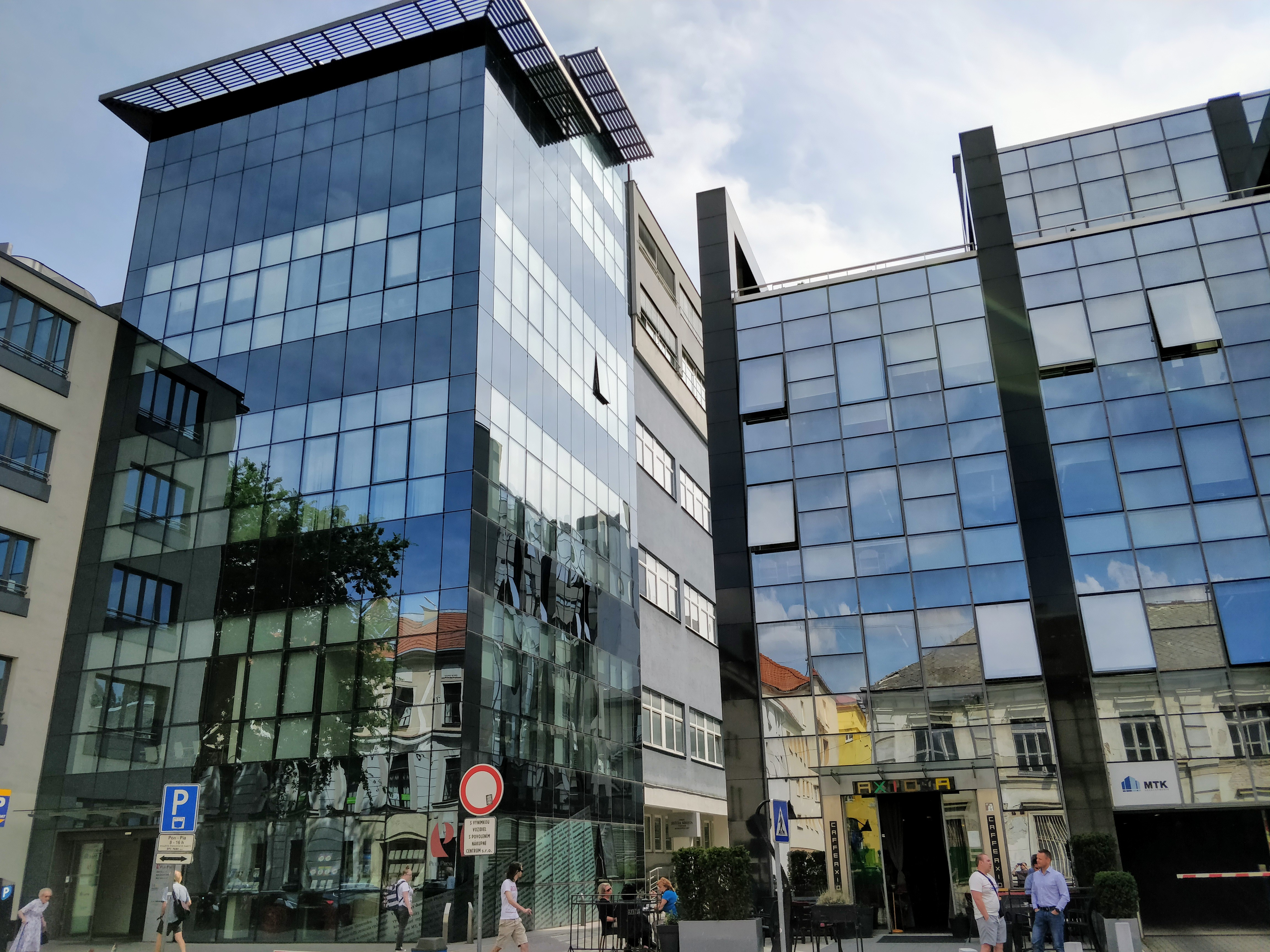 Lazaretská 12, Bratislava